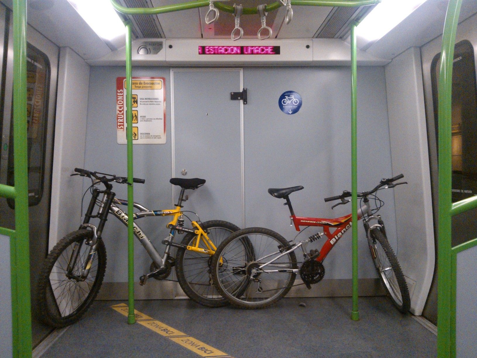 Bicicletas en un vagón de MetroValparaíso